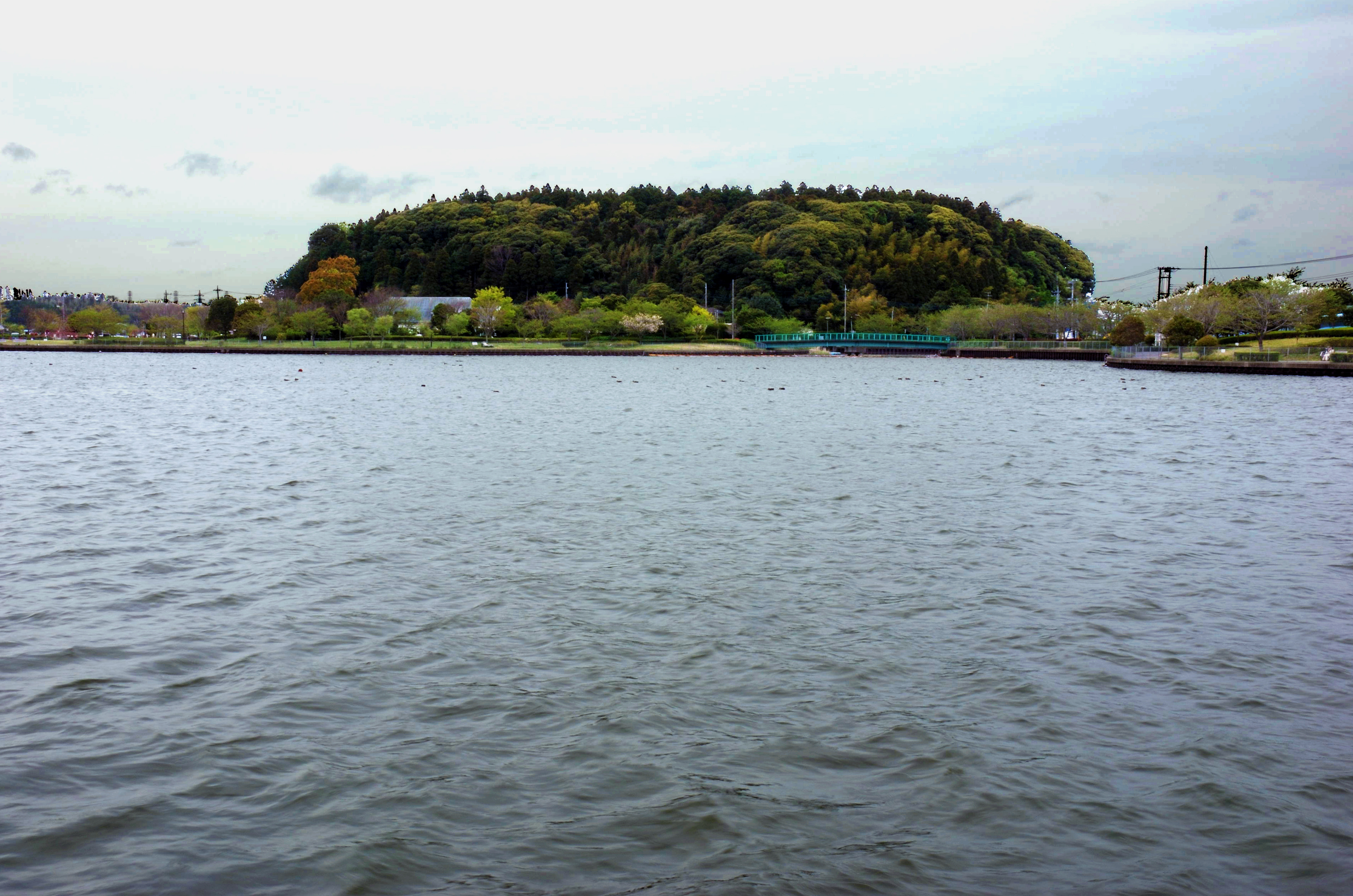 Sakata castle